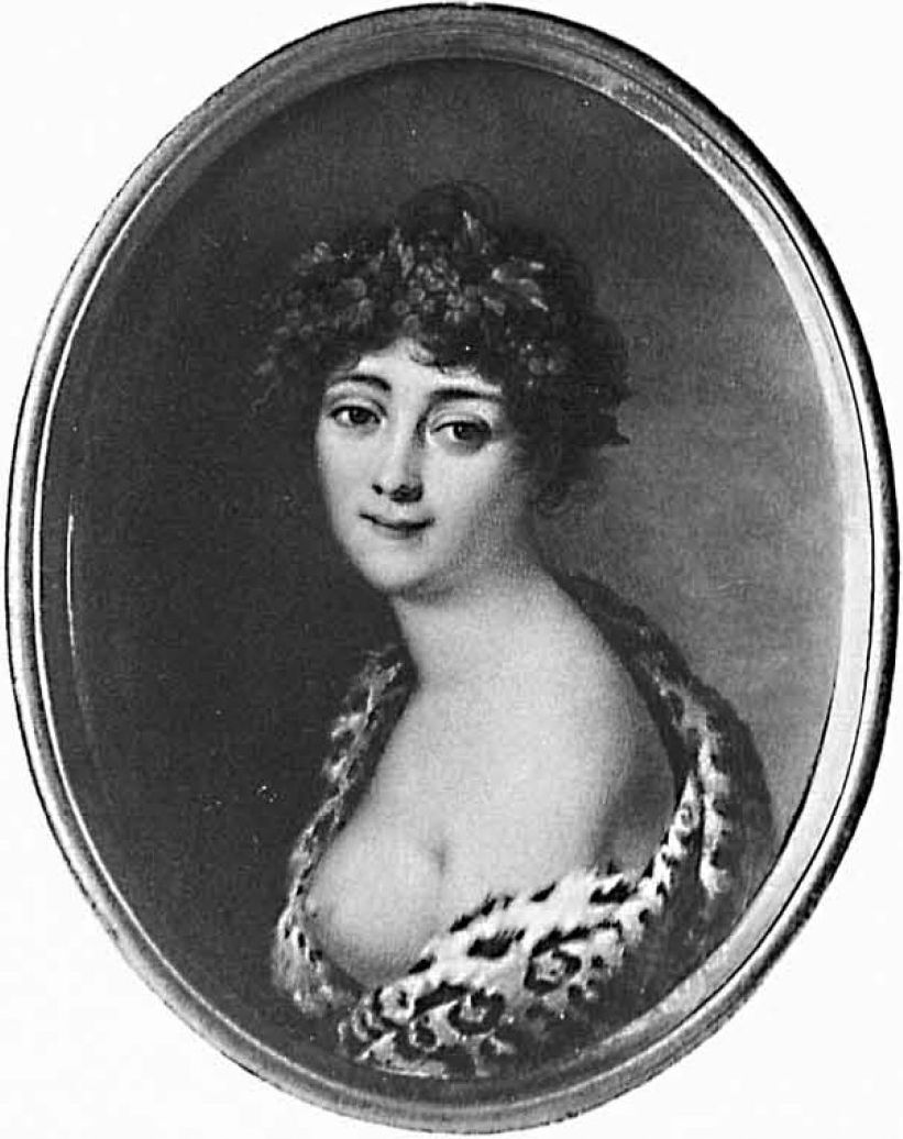 Евгения (Евдокия) Ивановна Колосова (1782-1869)